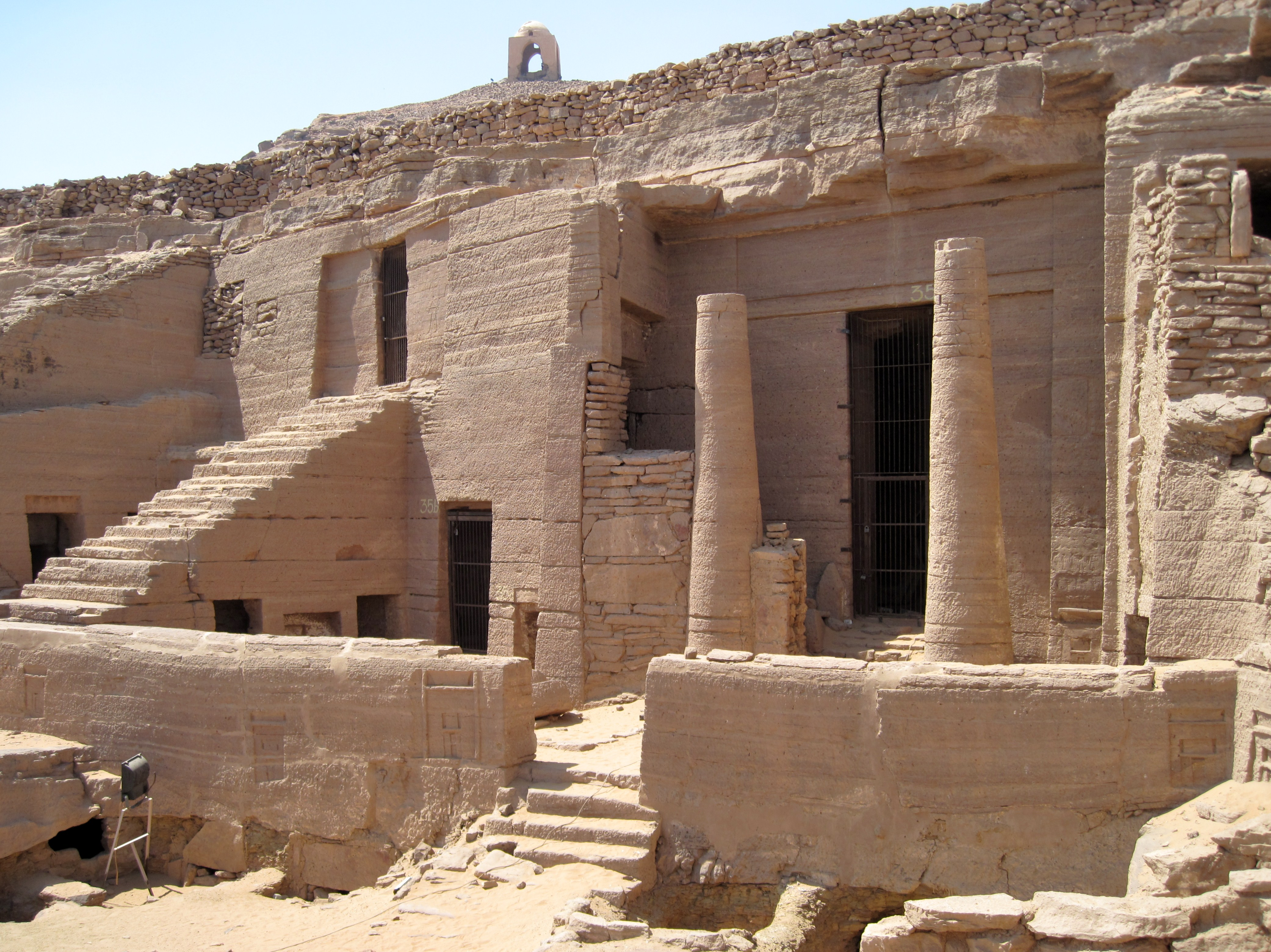 Eingang zum Felsengrab des Heqa-ib auf dem Qubbet el-Hawa bei Assuan, Ägypten